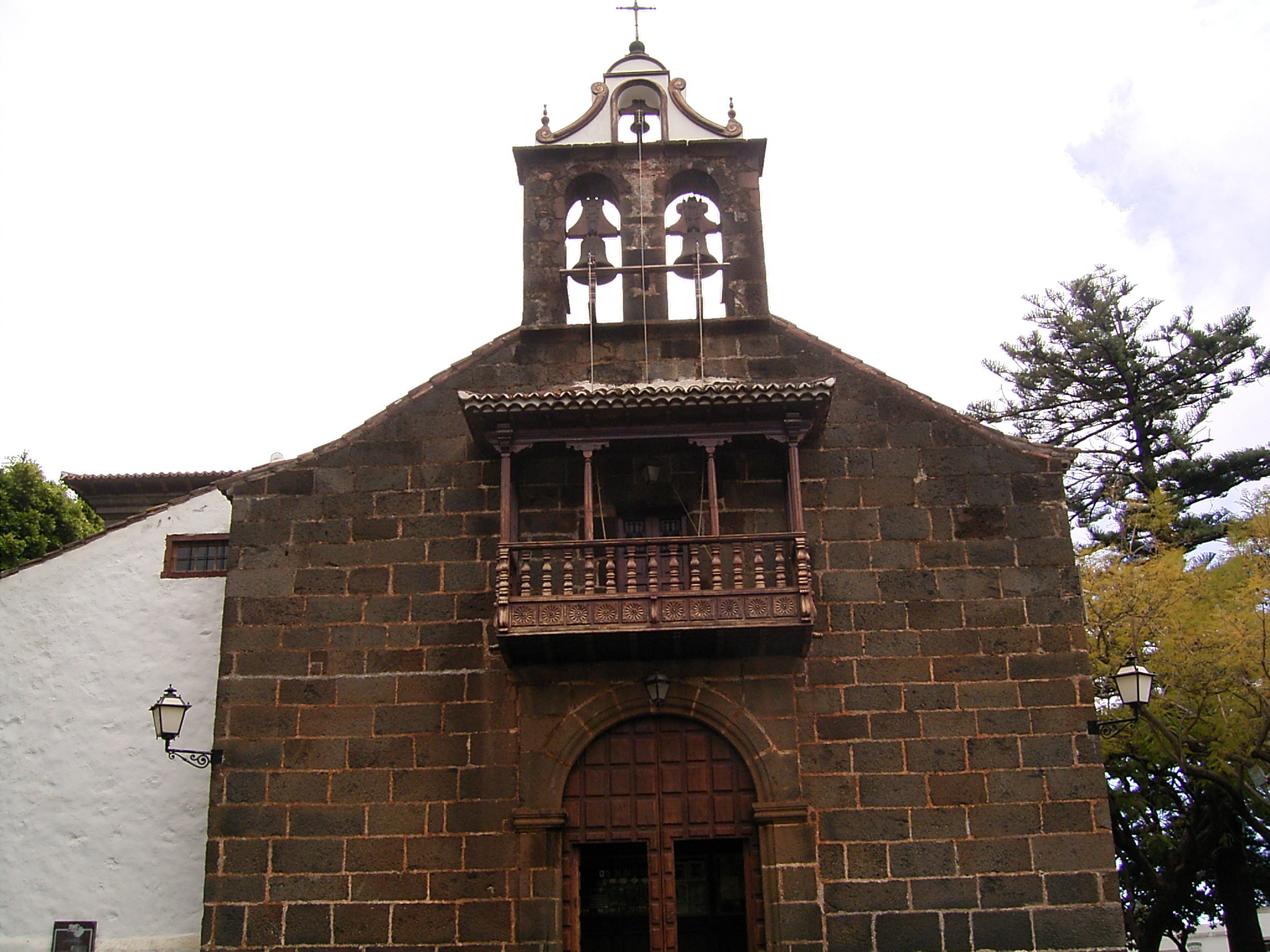 Virgen de las Nieves in Santa Cruz, La Palma, Canary Islands